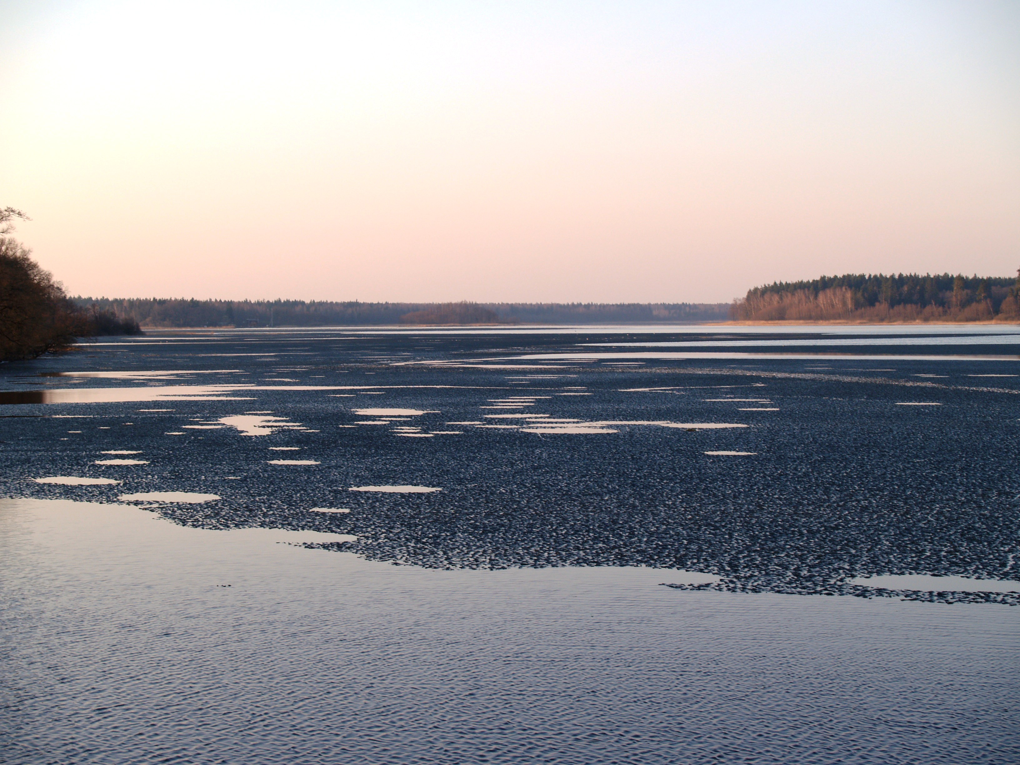 Sartų ežeras